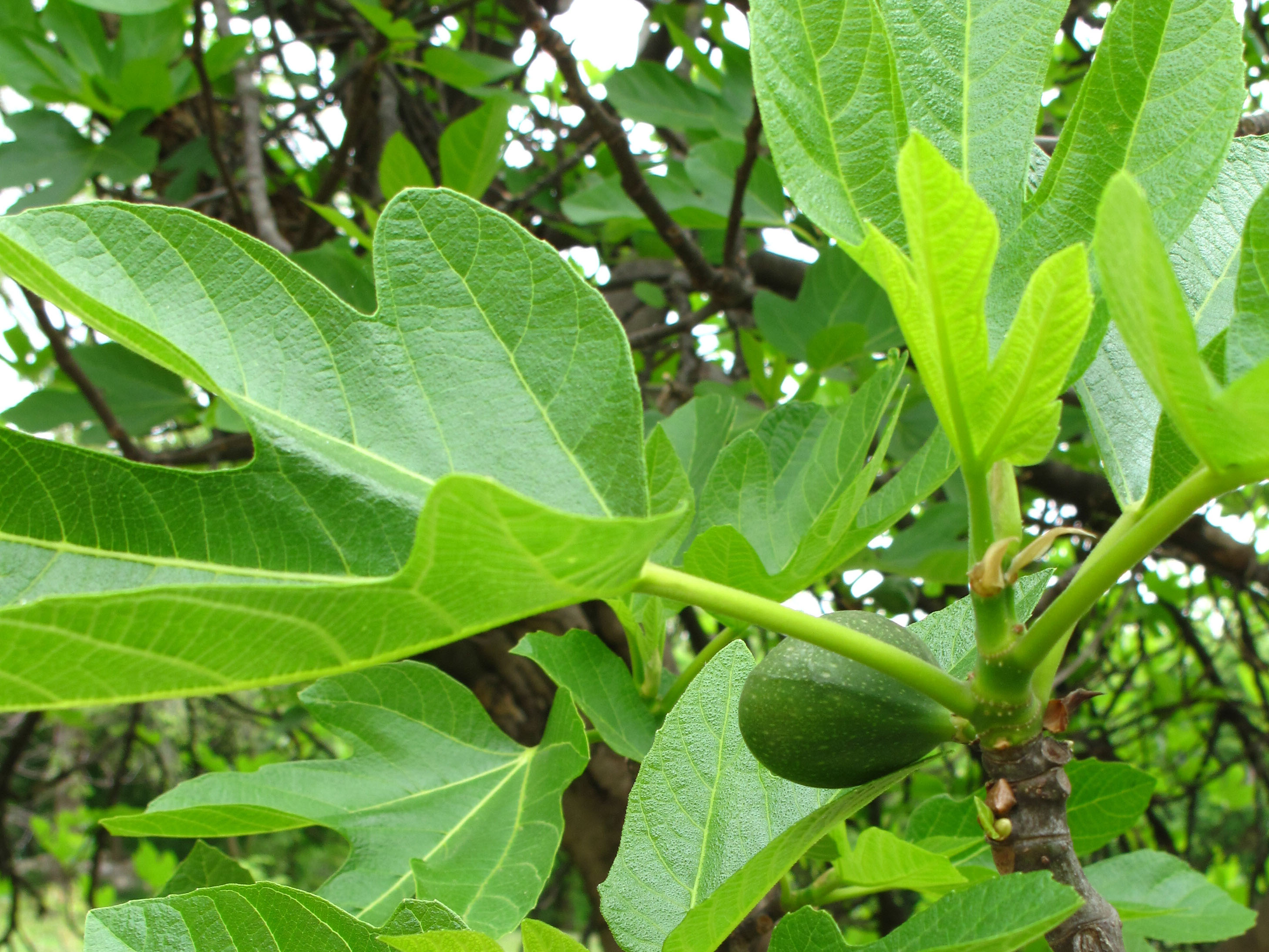 Costigiola - particolare del fico in primavera